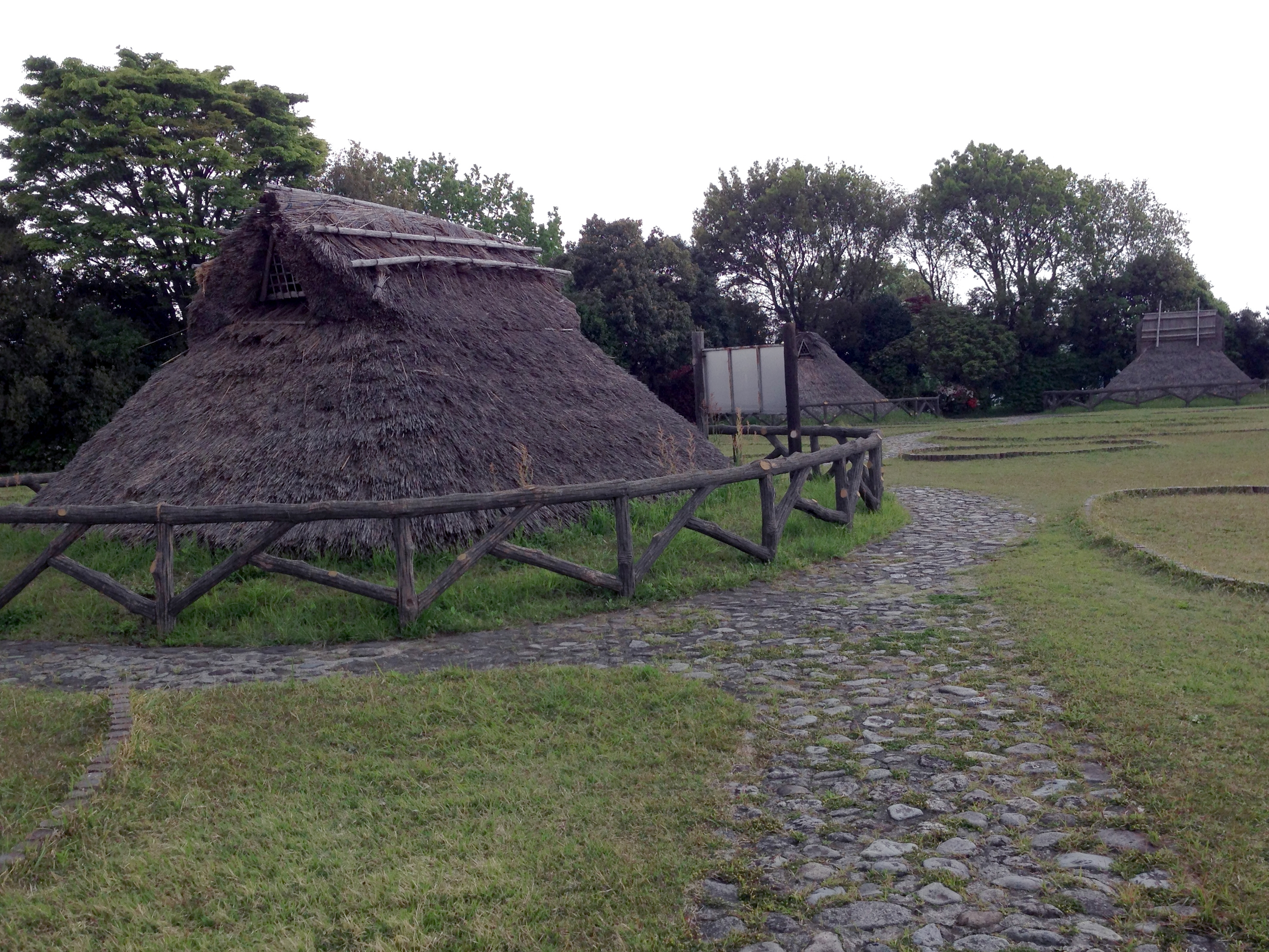 三殿台遺跡（神奈川県横浜市磯子区）